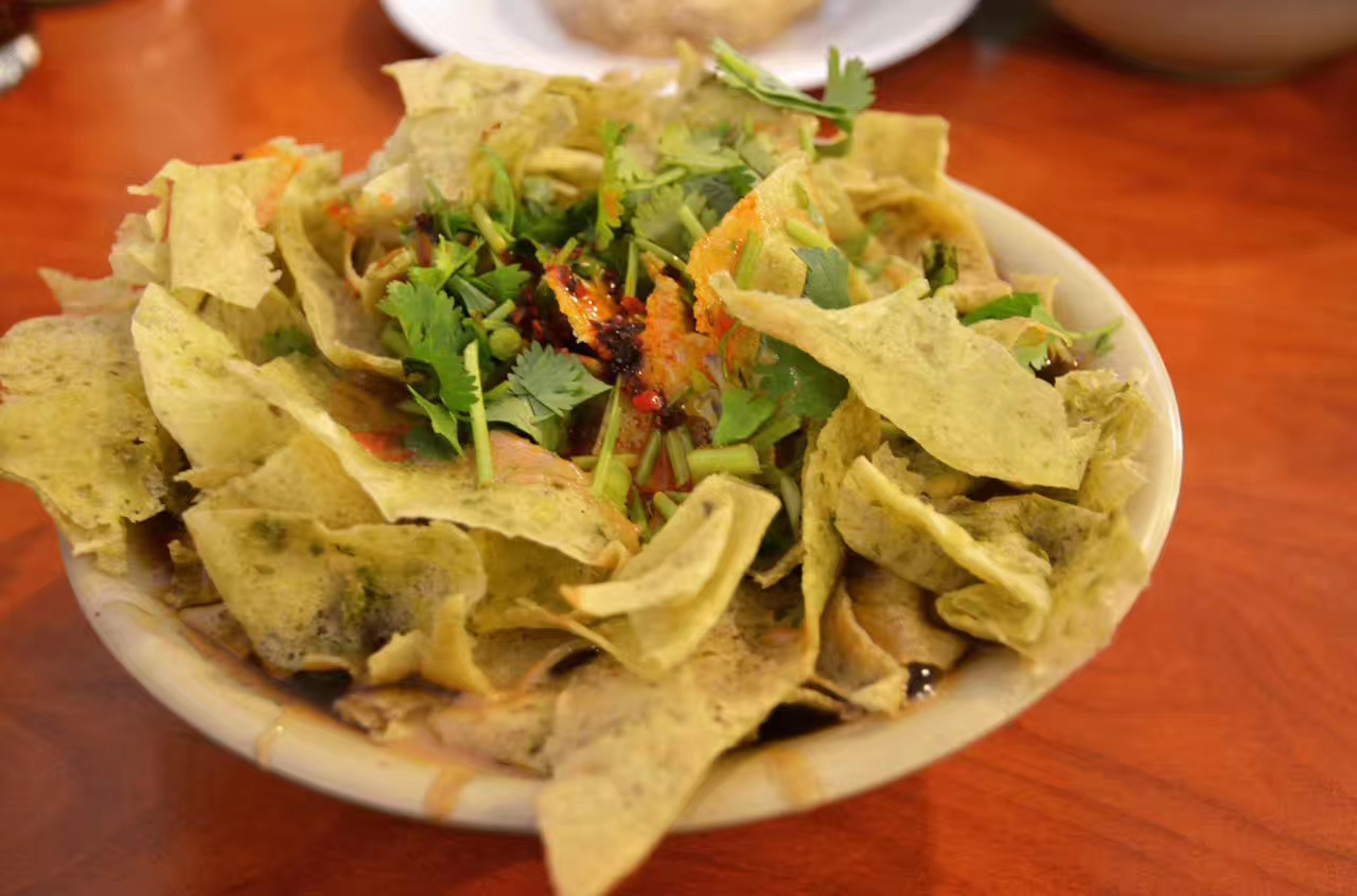 美国蒙特拉公园市金海餐厅的锅巴菜